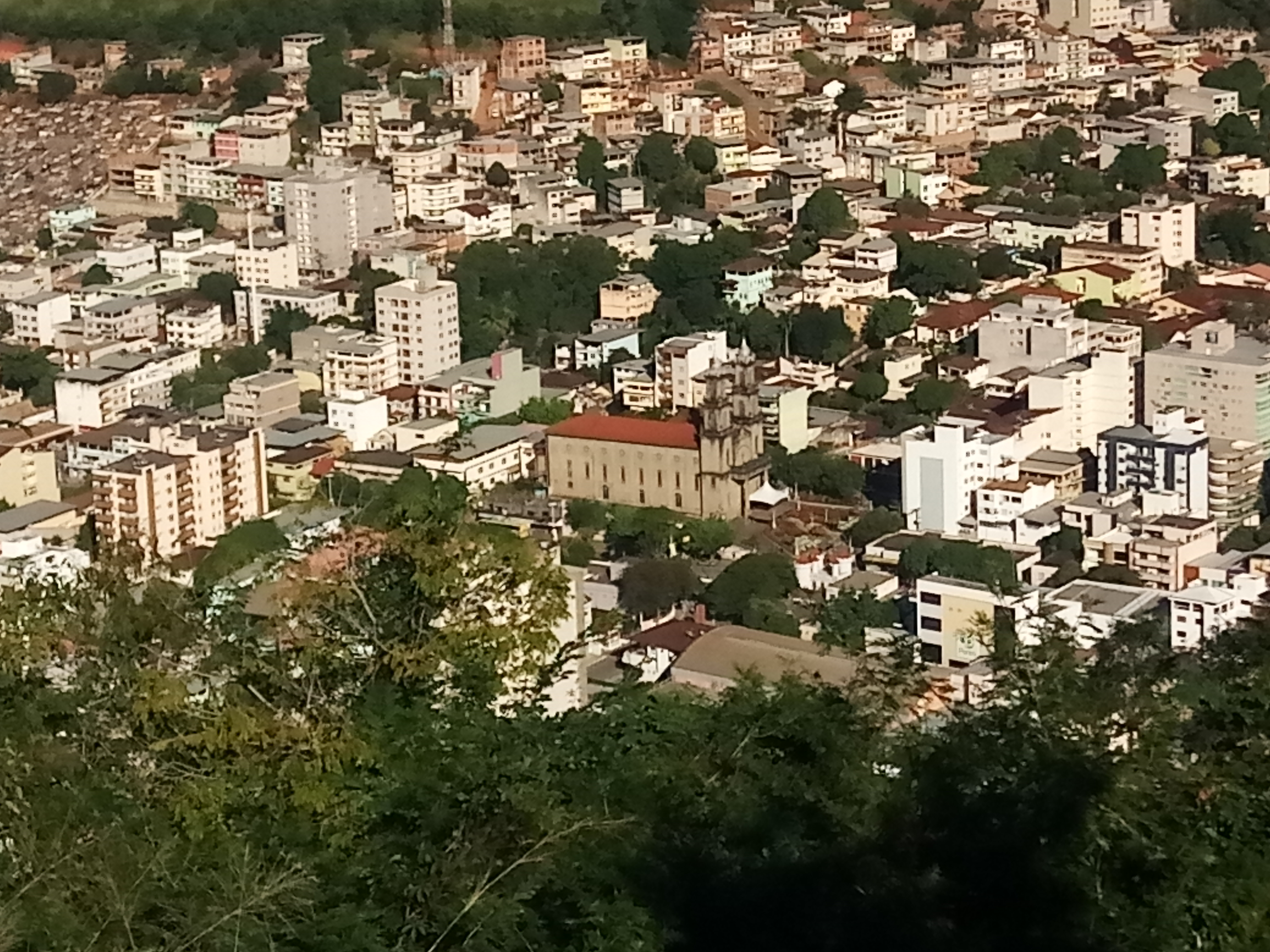 Igreja Matriz de Nossa Senhora da Penha: patrimônio cultural e histórico do Espírito Santo, em Castelo. Foto tirada do alto do Cruzeiro. Cultural property Q67000548, Castelo, Espírito Santo, Espírito Santo, Brazil Q67000548, P727